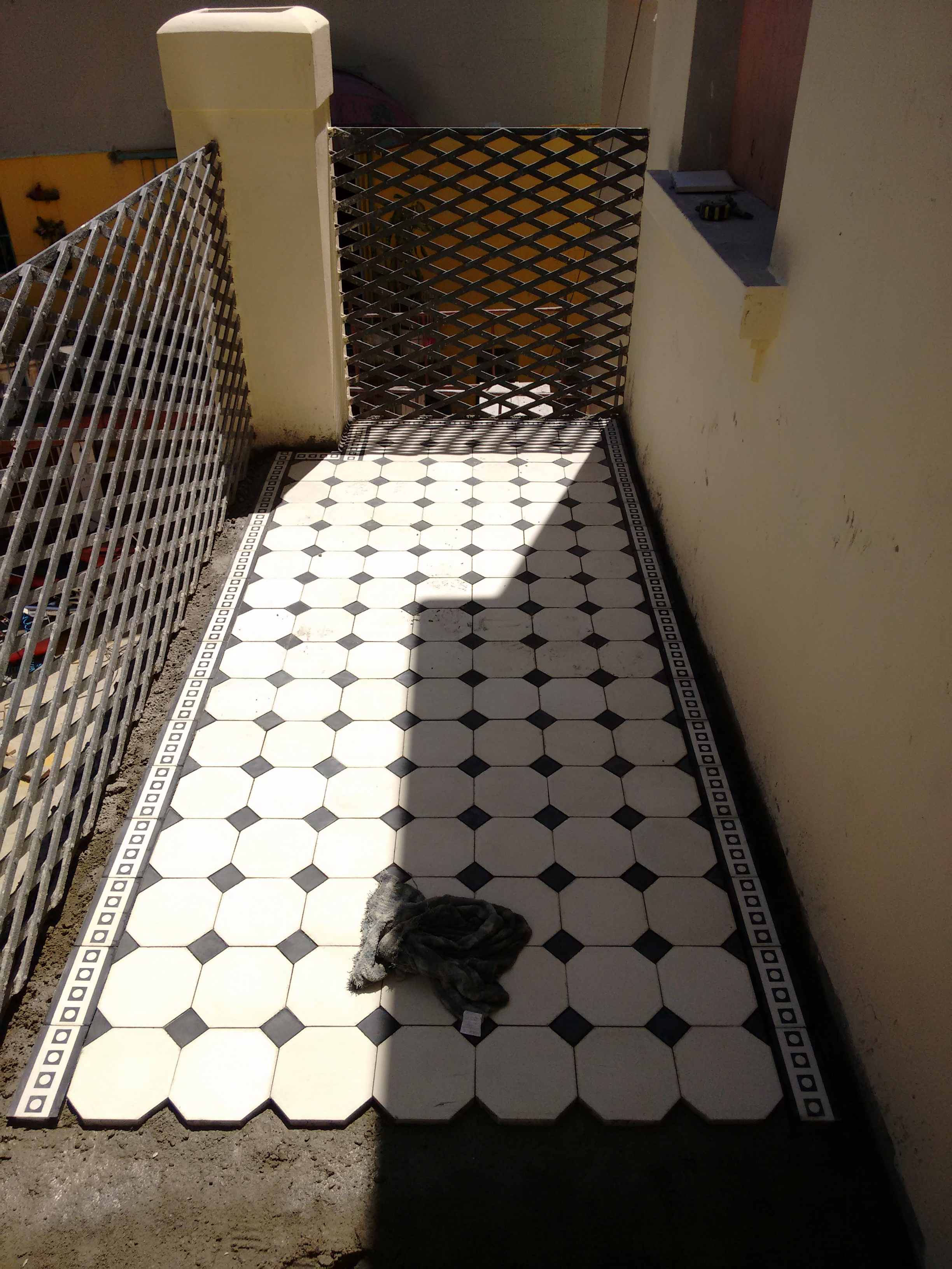 Interior Castelinho da Rua Apa em processo de restauro, São Paulo (SP), Brasil. Azulejos sendo colocados.